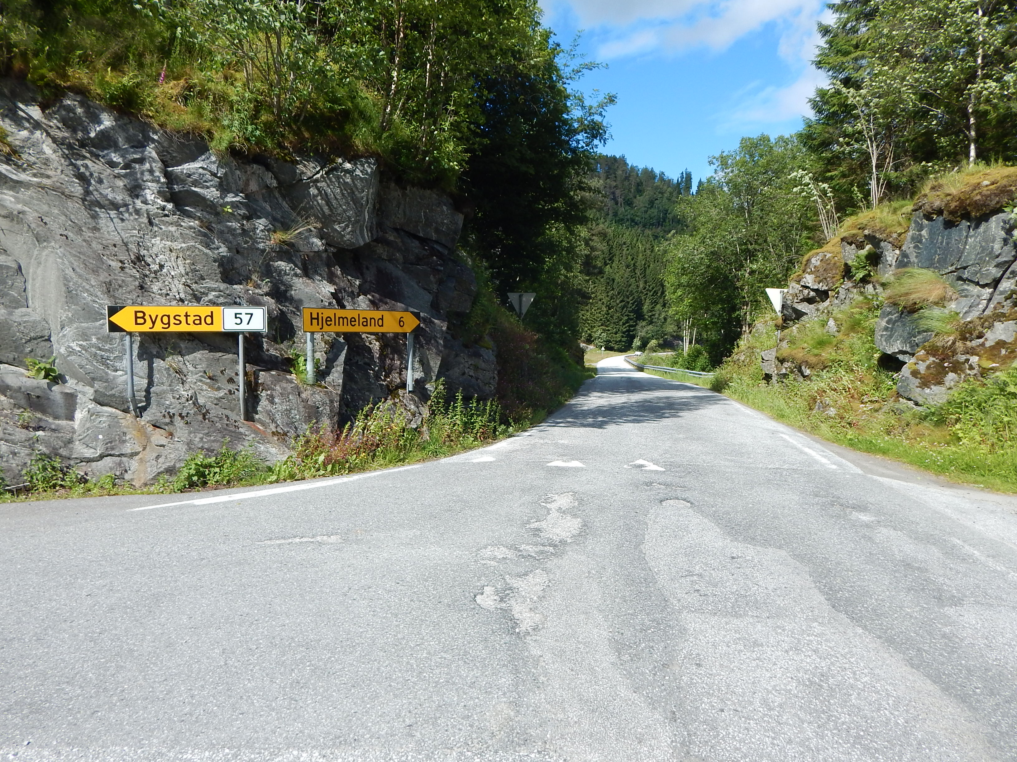 Fylkesvei 422 tar av fra primær fylkesvei 57 ved Osen bru